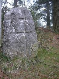 Ameikutz mugarria